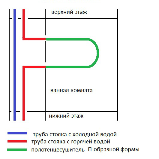 Стандартная схема подключения полотенцесушителя в многоэтажном доме